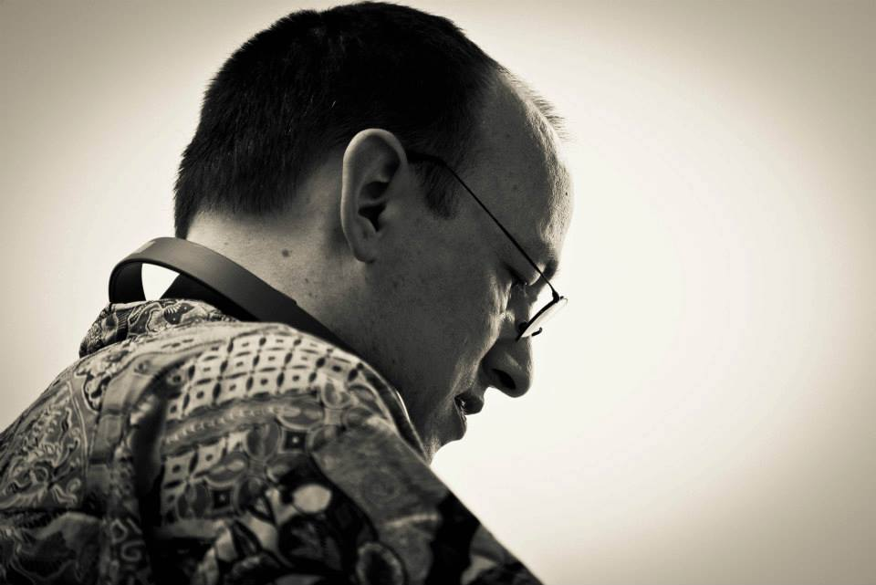 Porträt Michael Brückner